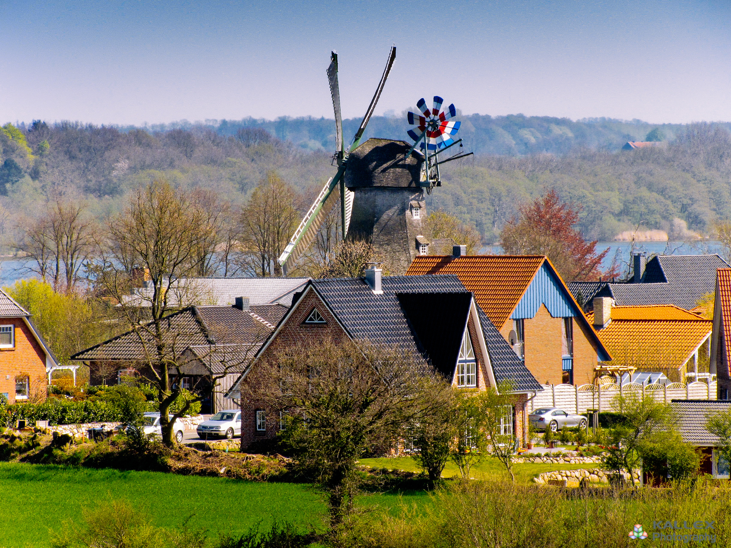 Mühle in Groß-Wittensee